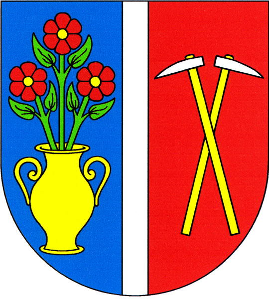 Znak obce Tmaň